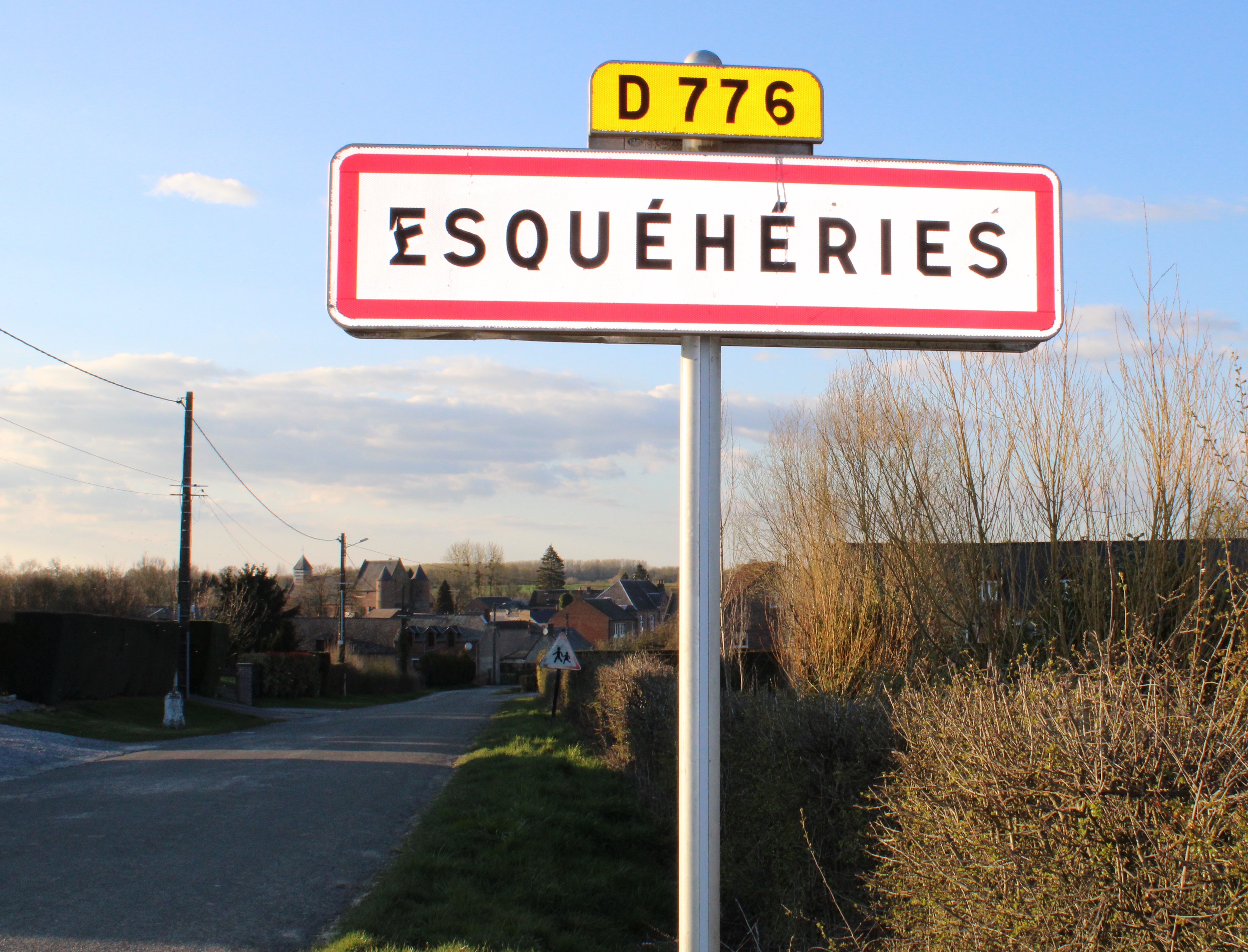 Entrée du village